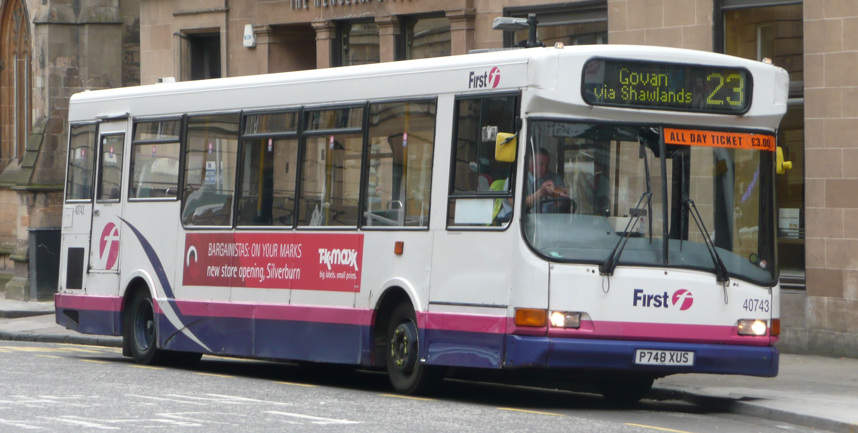 A First Glasgow Dennis Dart/UVG P748 XUS bus in Glasgow.